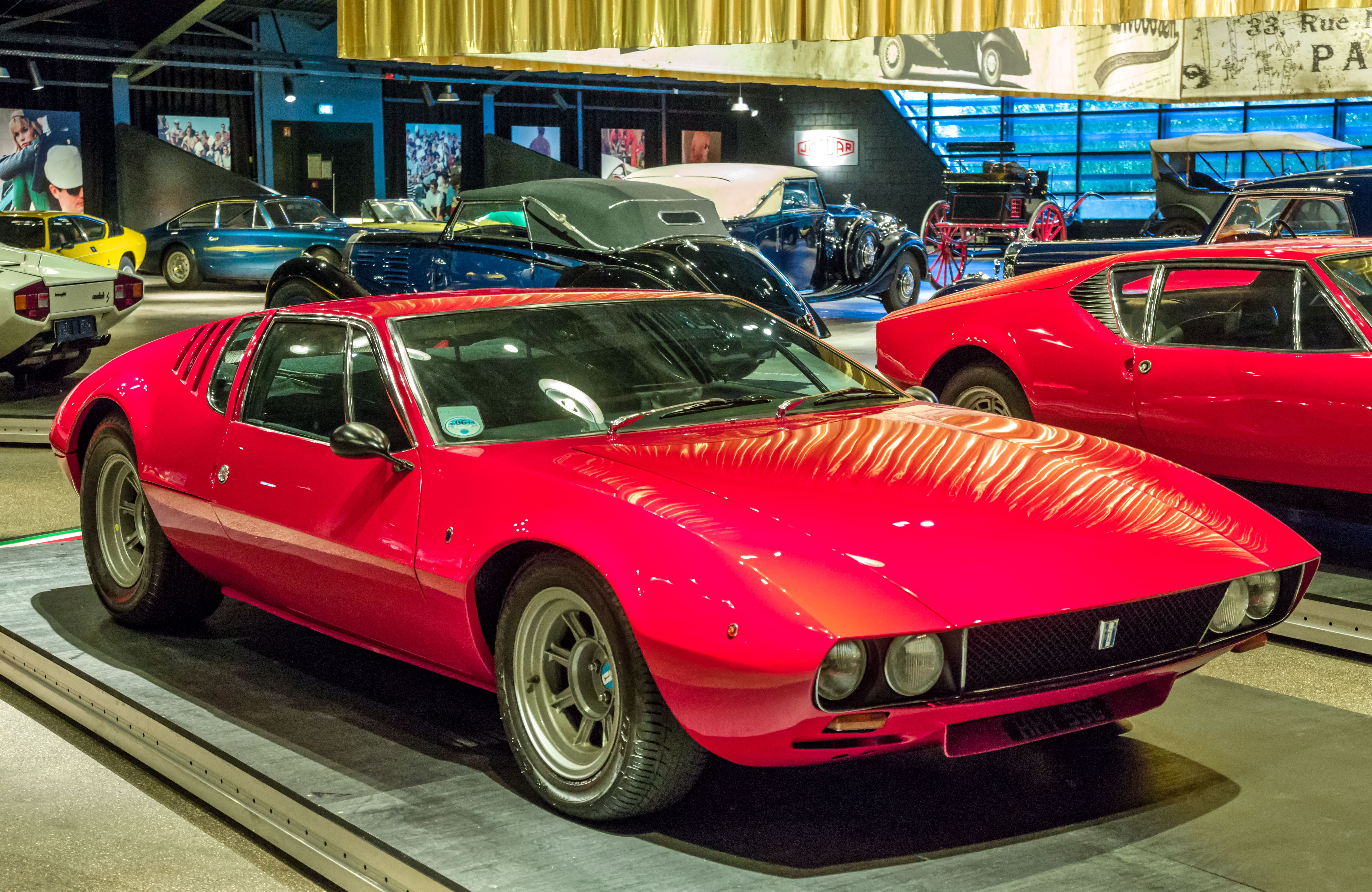 Das Volante Oldtimermuseum in Kirchzarten